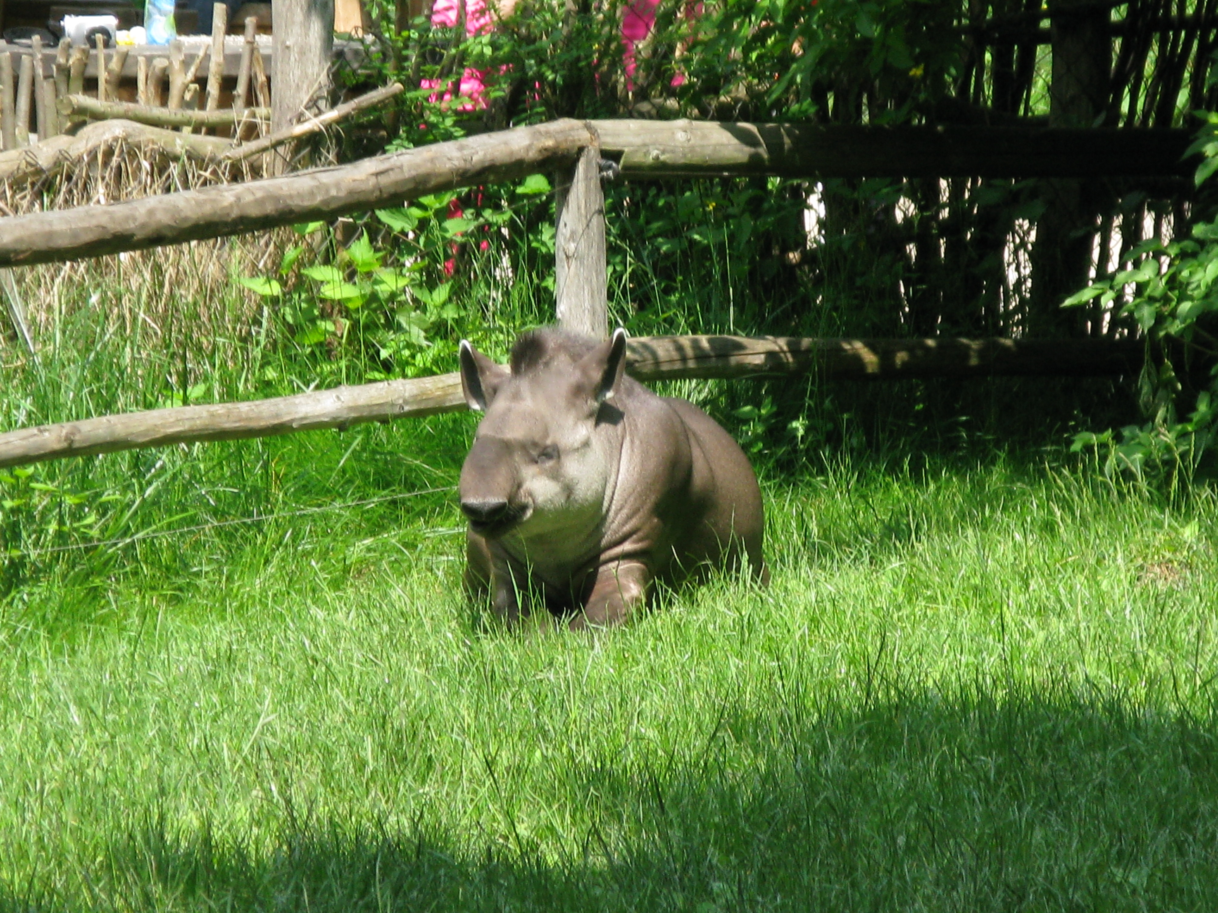 Tapir du Brésil (tapirus terrestris) tapi dans l'herbe, zoo de Prague.